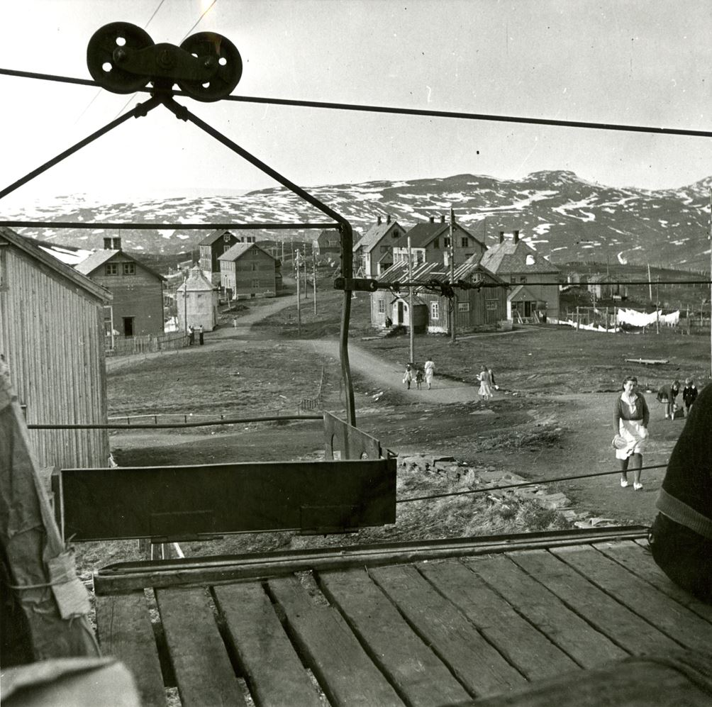 Foto: Ukebladet AKTUELL A/S